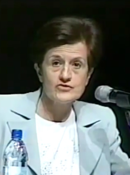 Adela Cortina.